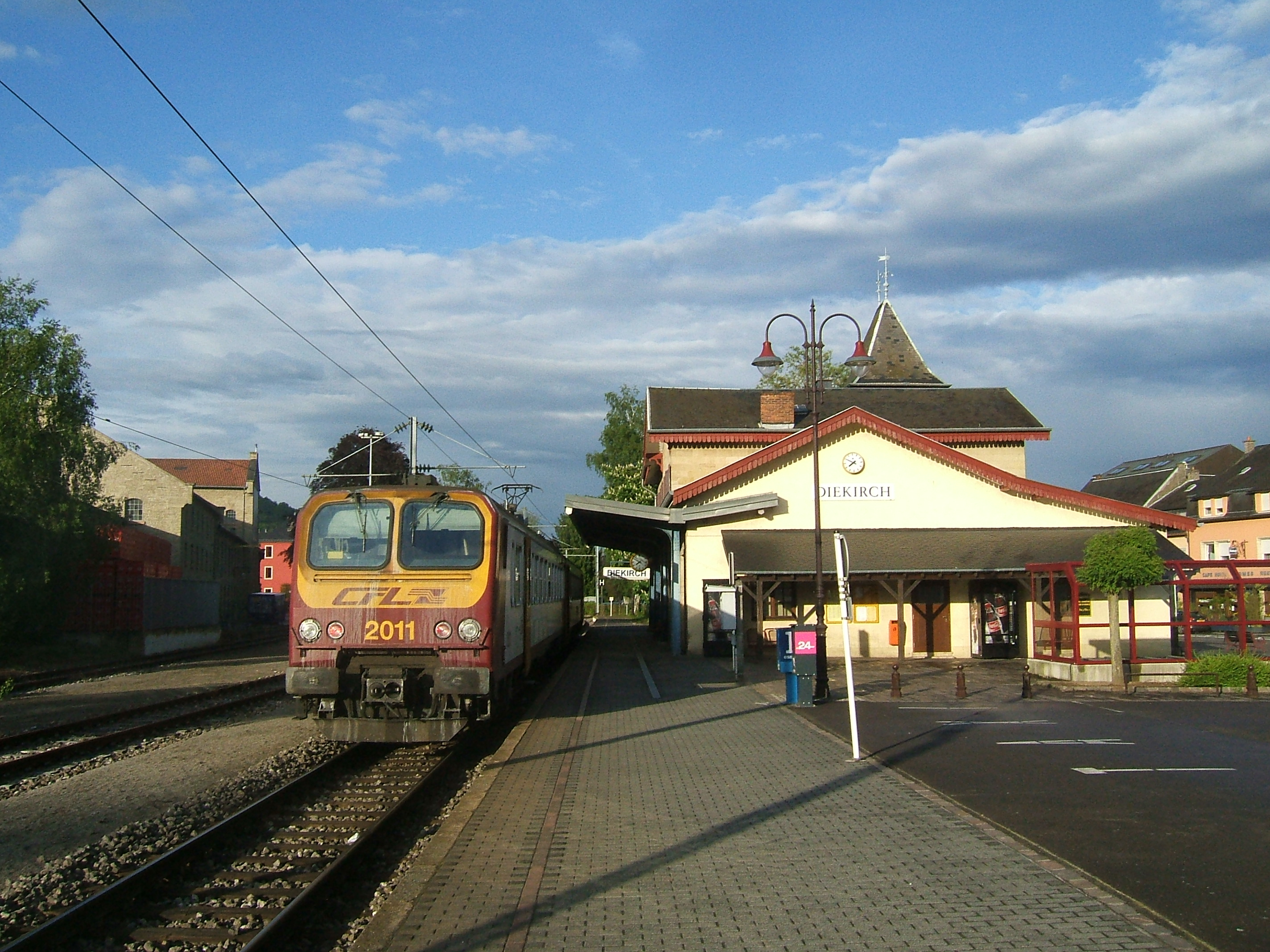 Diekirch station